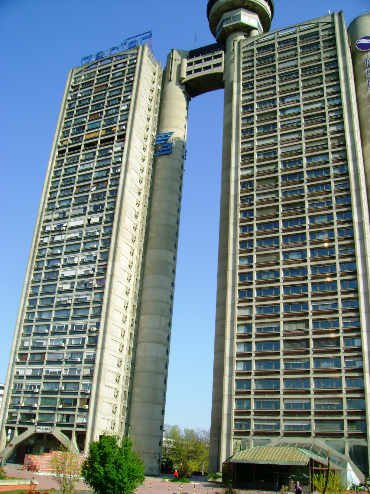 Genex